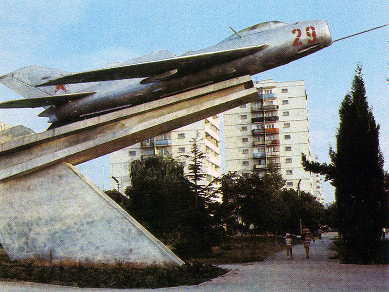 МиГ-19 поставленный у здания ДОСААФ в честь открытия. Пр. Генерала Острякова д.15